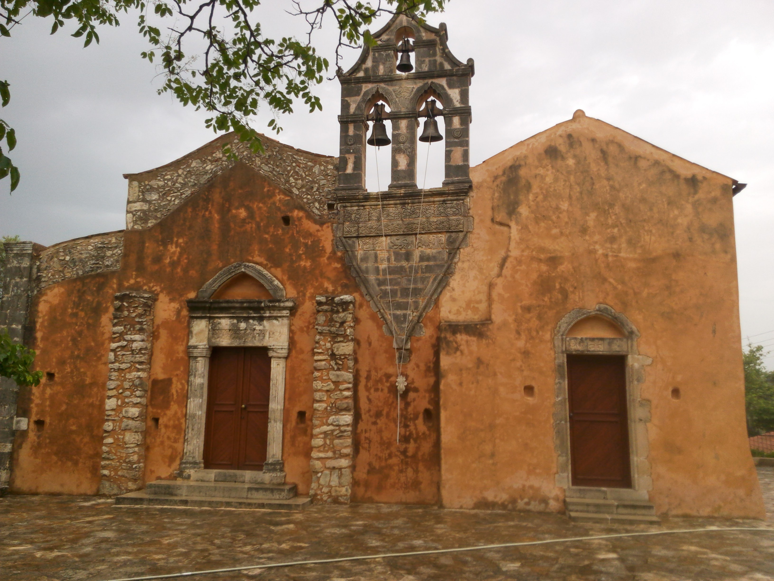 Ναός Αγίου Γεωργίου στον Κουρνά Χανίων